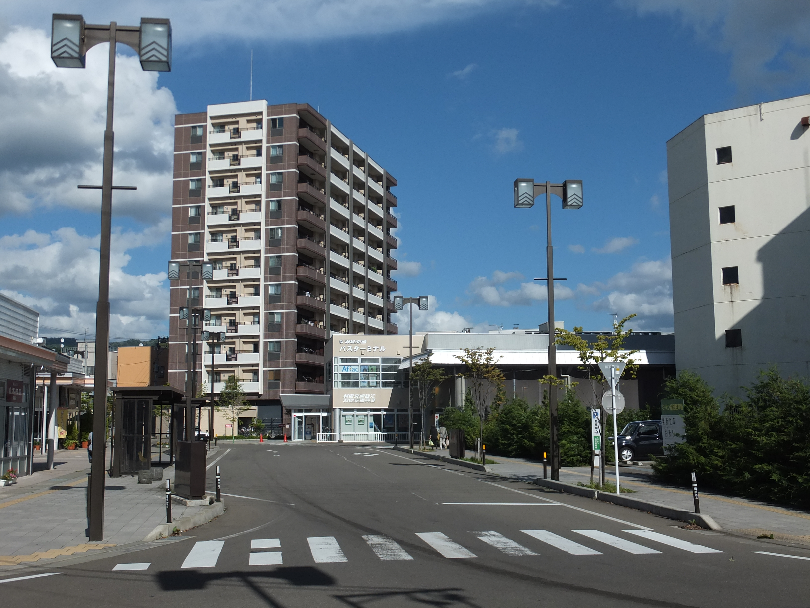 秋田県横手市、横手駅東口の再開発地区「よこてイースト」内にある分譲マンション「ランドシティ横手駅前」と横手バスターミナル。